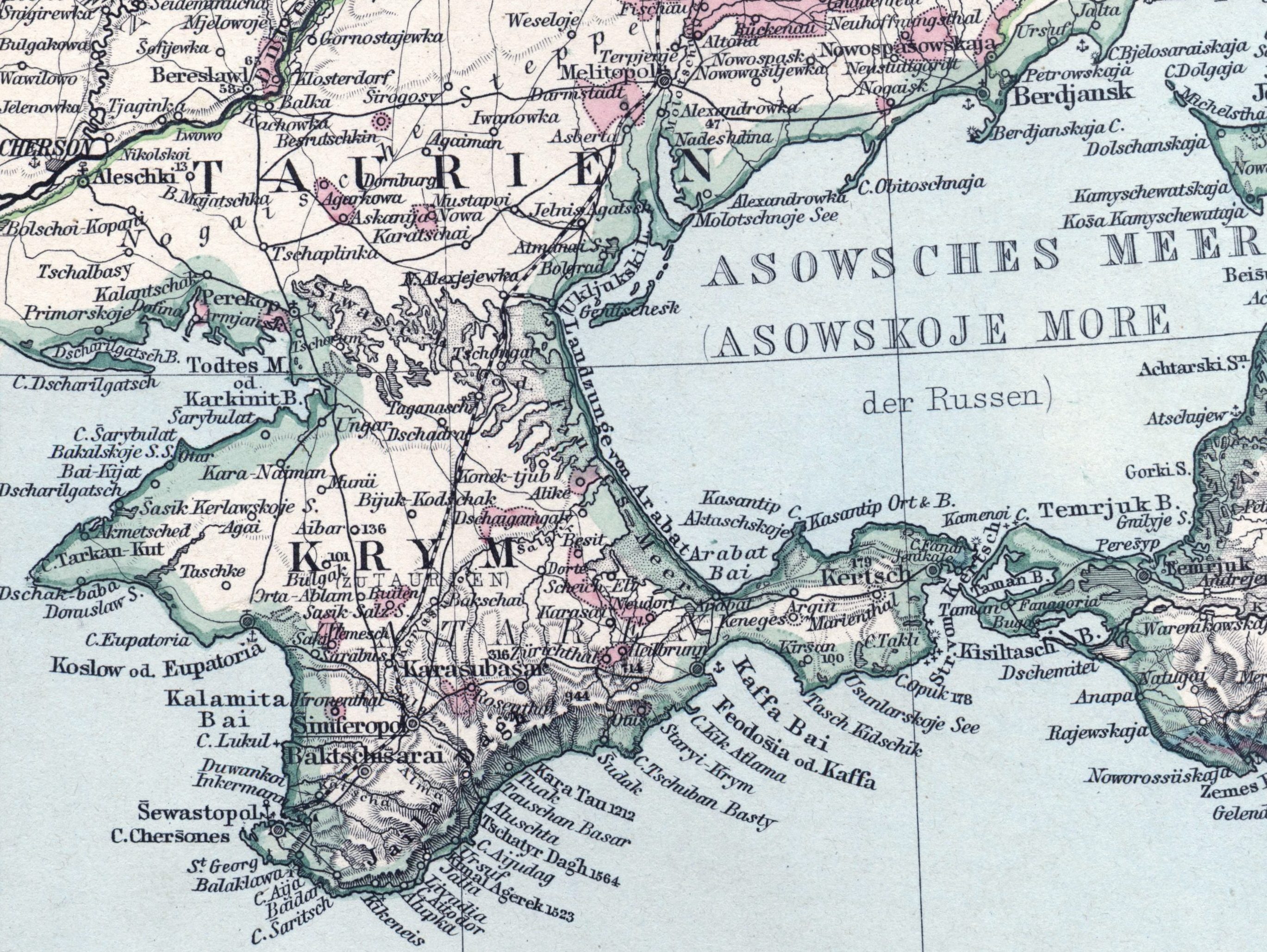 Siedlungsgebiete der Krimdeutschen um 1890 (rot) im Süden der Ukraine, Russisches Reich